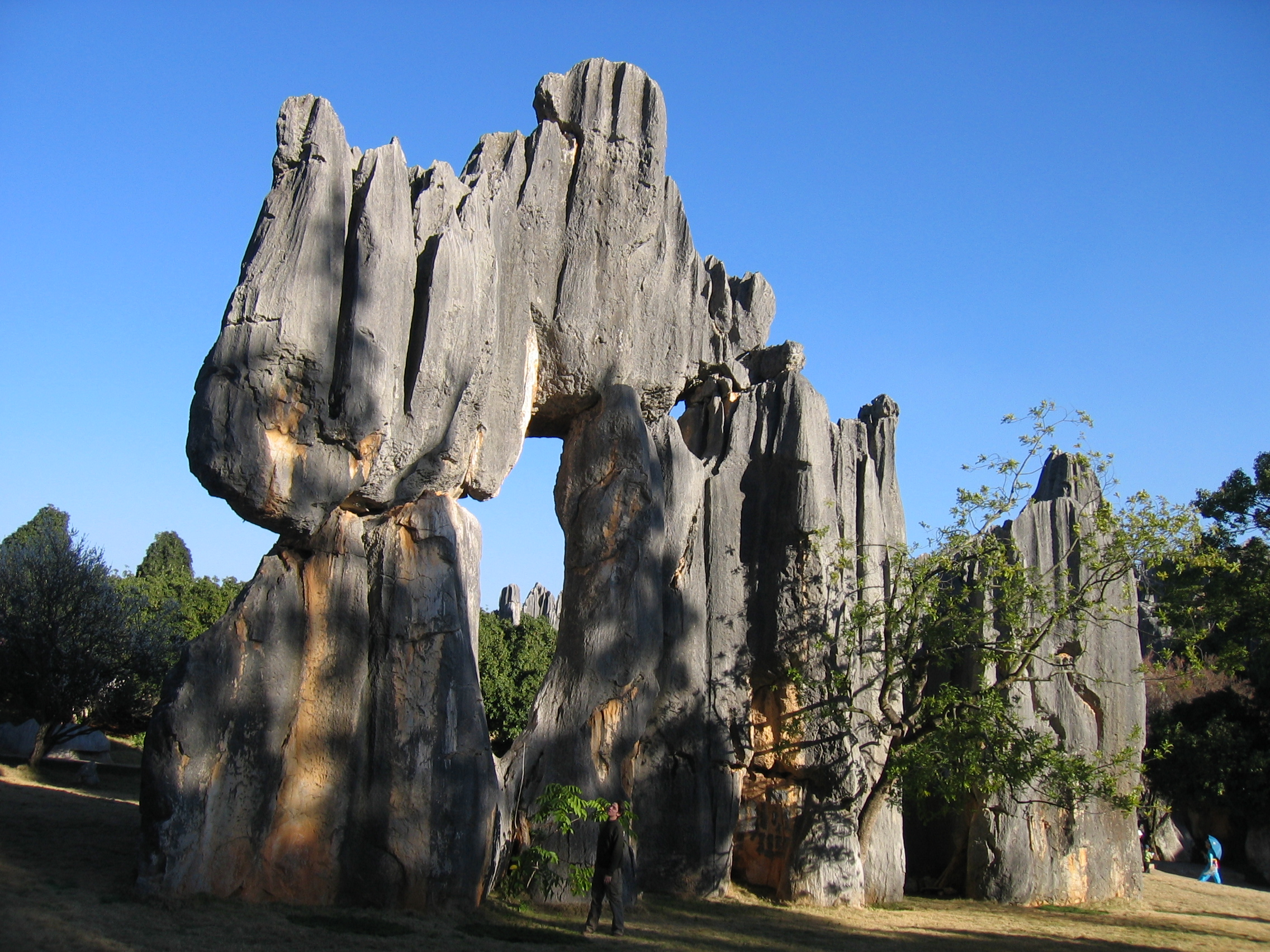 Größenvergleich des Karstgesteins zu Menschen